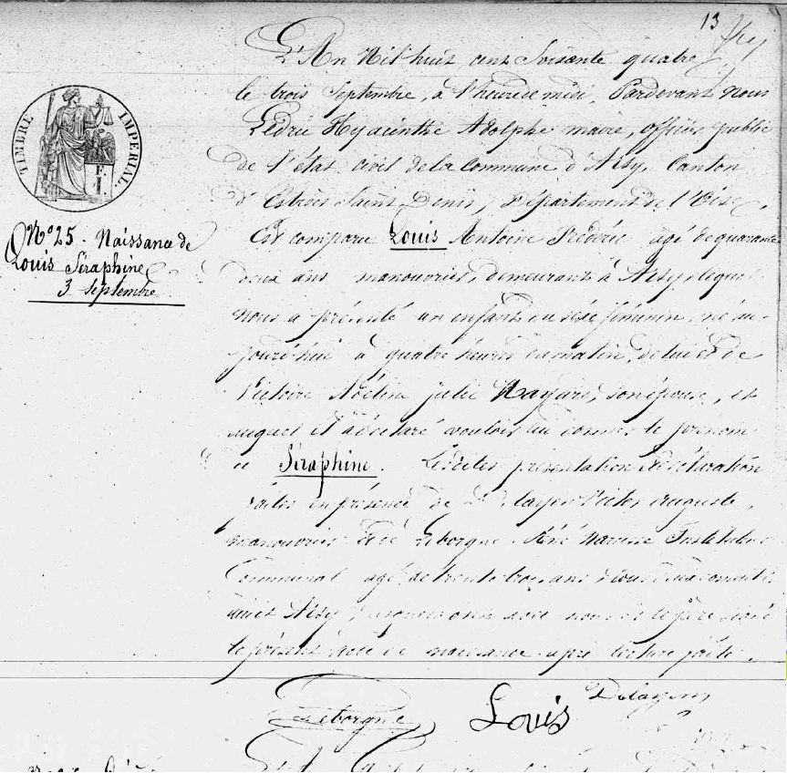 Copie de l'acte de naissance de Séraphine Louis, dite Séraphine de Senlis, née le 3 septembre 1864 à Arsy (Oise, France)